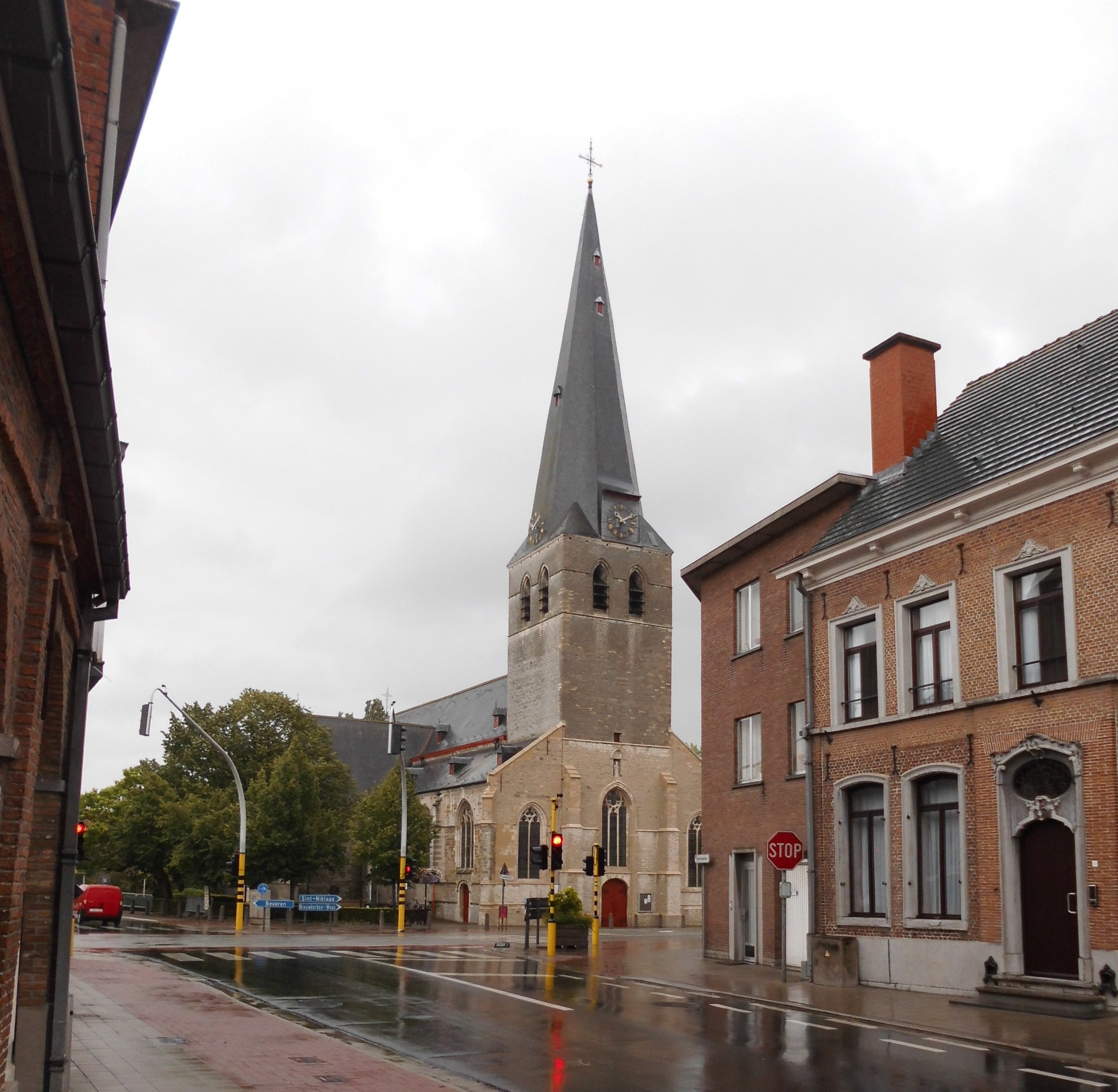 Parochiekerk Heilig Kruis - Kerkstraat - Vrasene - Beveren - Oost-Vlaanderen - België